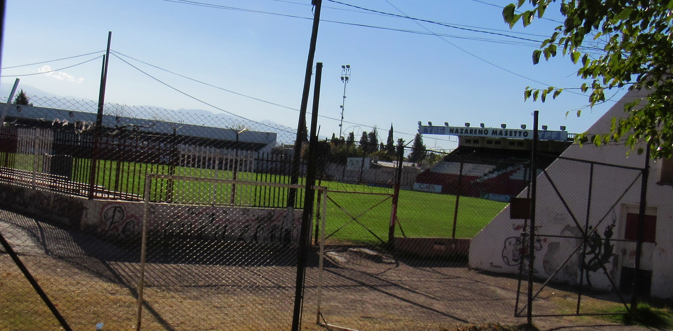 Instalaciones del Club Deportivo Maipu en Maipú, Mendoza, Argentina.